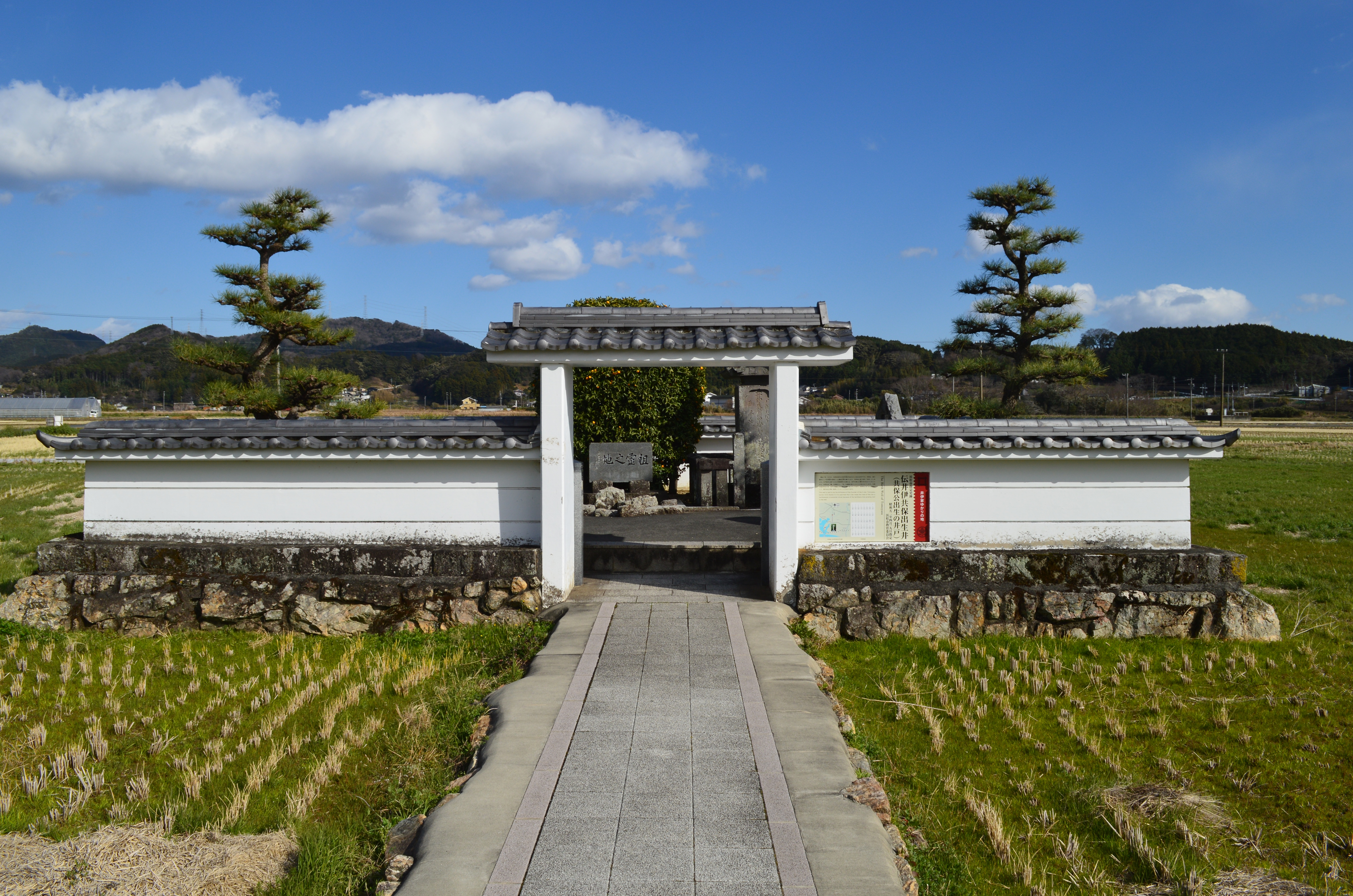 伝井伊共保出生井 (共保公出生の井戸)